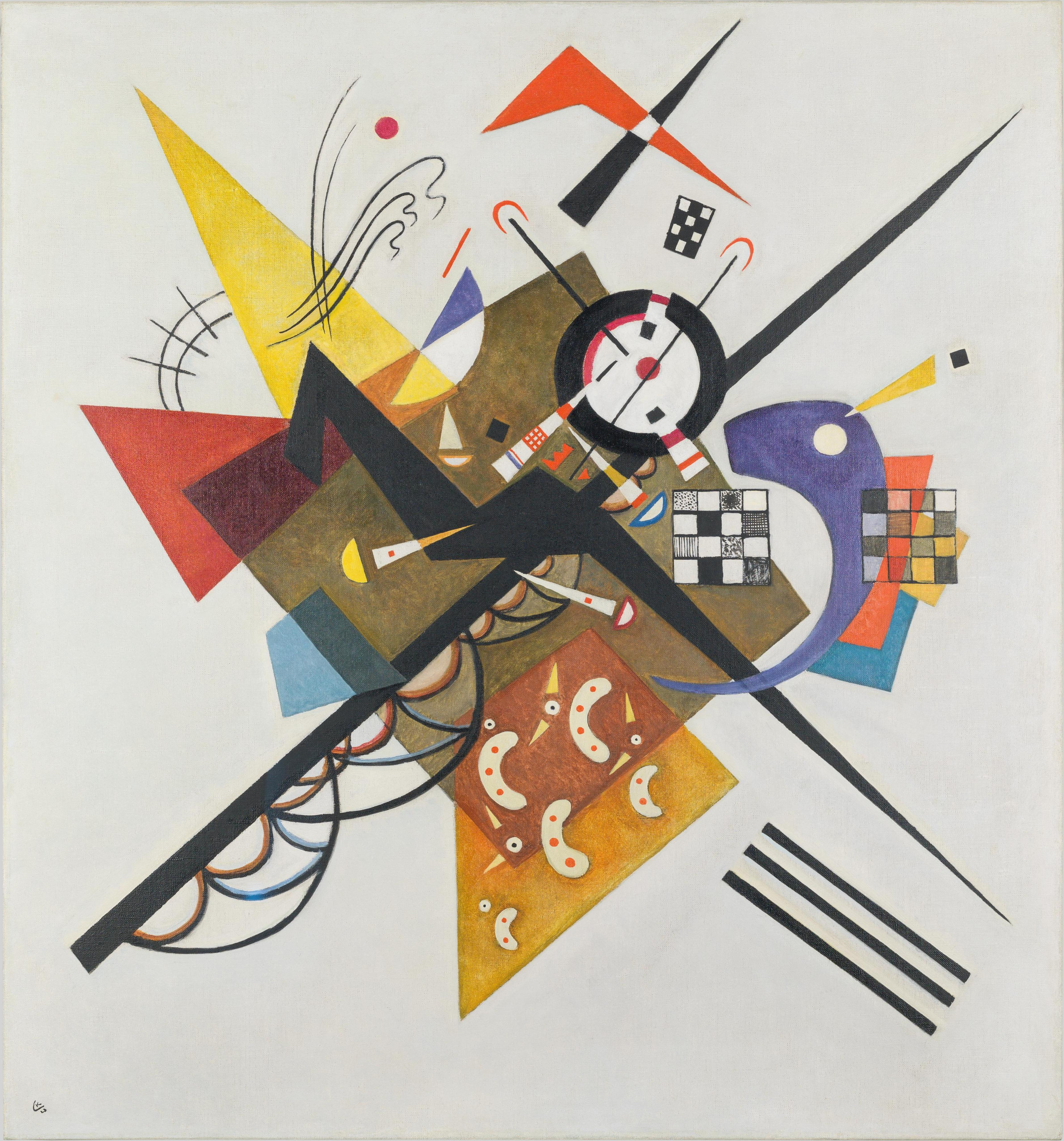 On White II, huile sur toile, 105 cm x 98 cm, Musée National d'Art Moderne, Paris